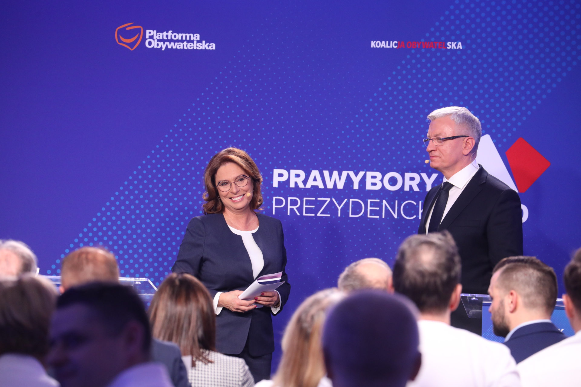 Platforma Obywatelska. Debata prawyborcza w Warszawie, 7 grudnia 2019 r., przed wyborami prezydenckimi w 2020 r. N.z.: Małgorzata Kidawa-Błońska i Jacek Jaśkowiak.